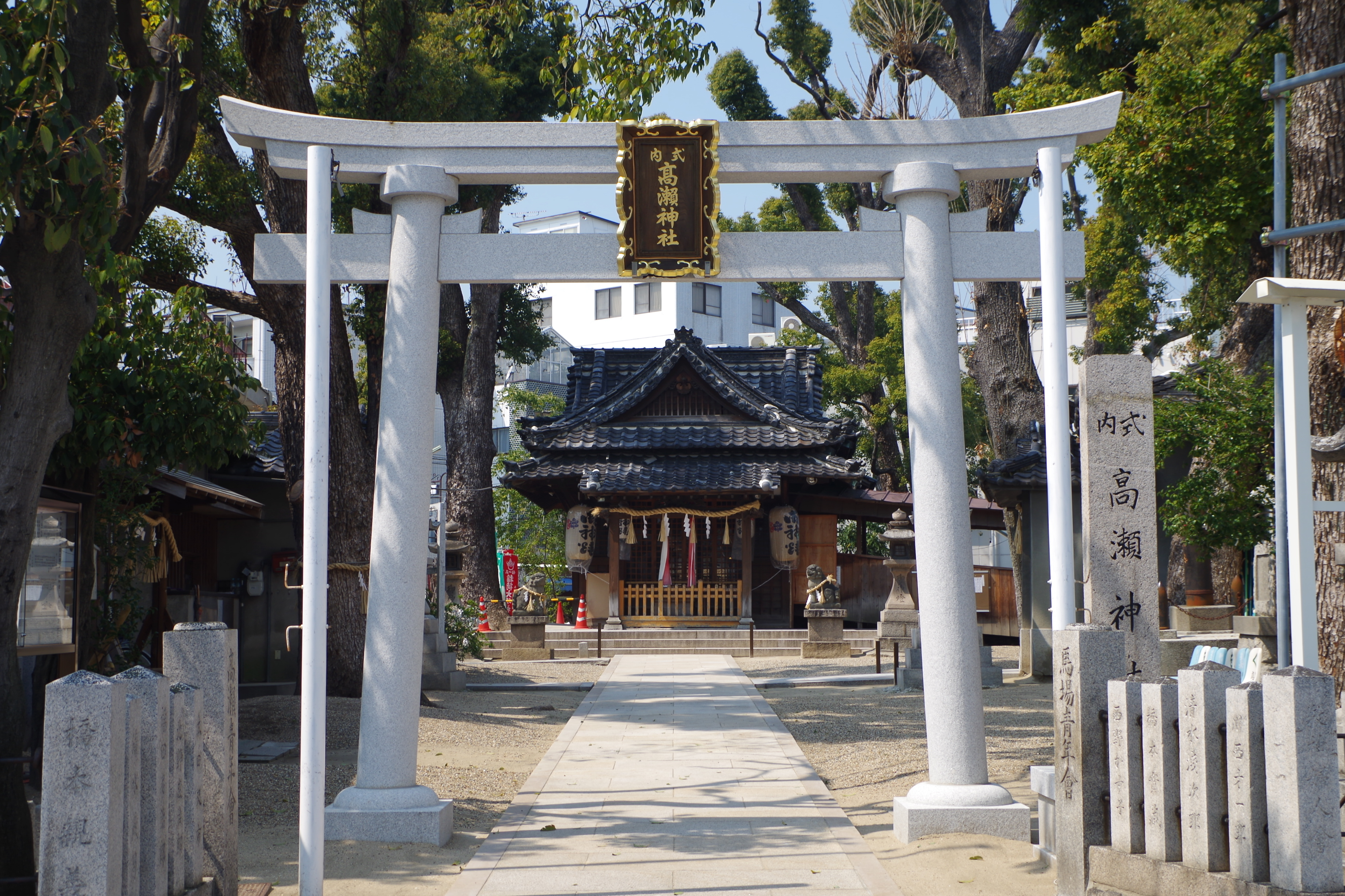 高瀬神社 守口市馬場町1丁目 Takase-jinja 2014.3.24